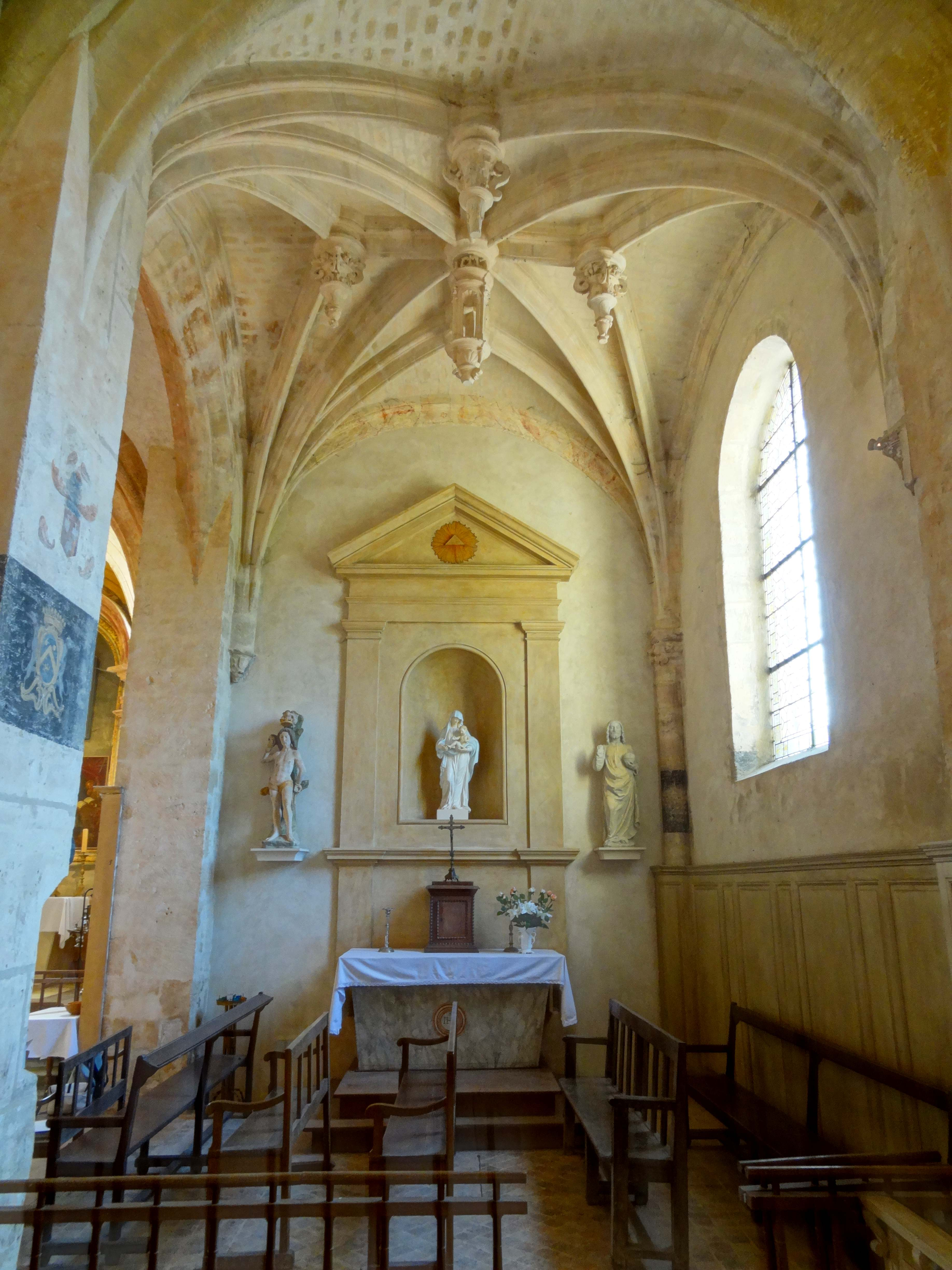 Intérieur de l'église - voir titre.